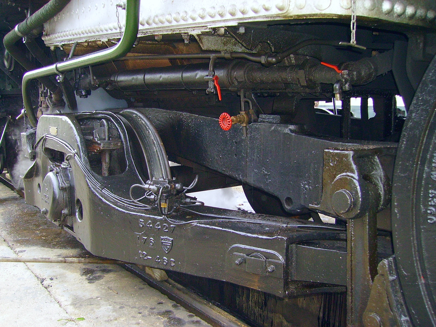 Le bissel Delta de la 141 R 1199 (dépôt de Villeneuve-St-Georges le 05/05/2007).